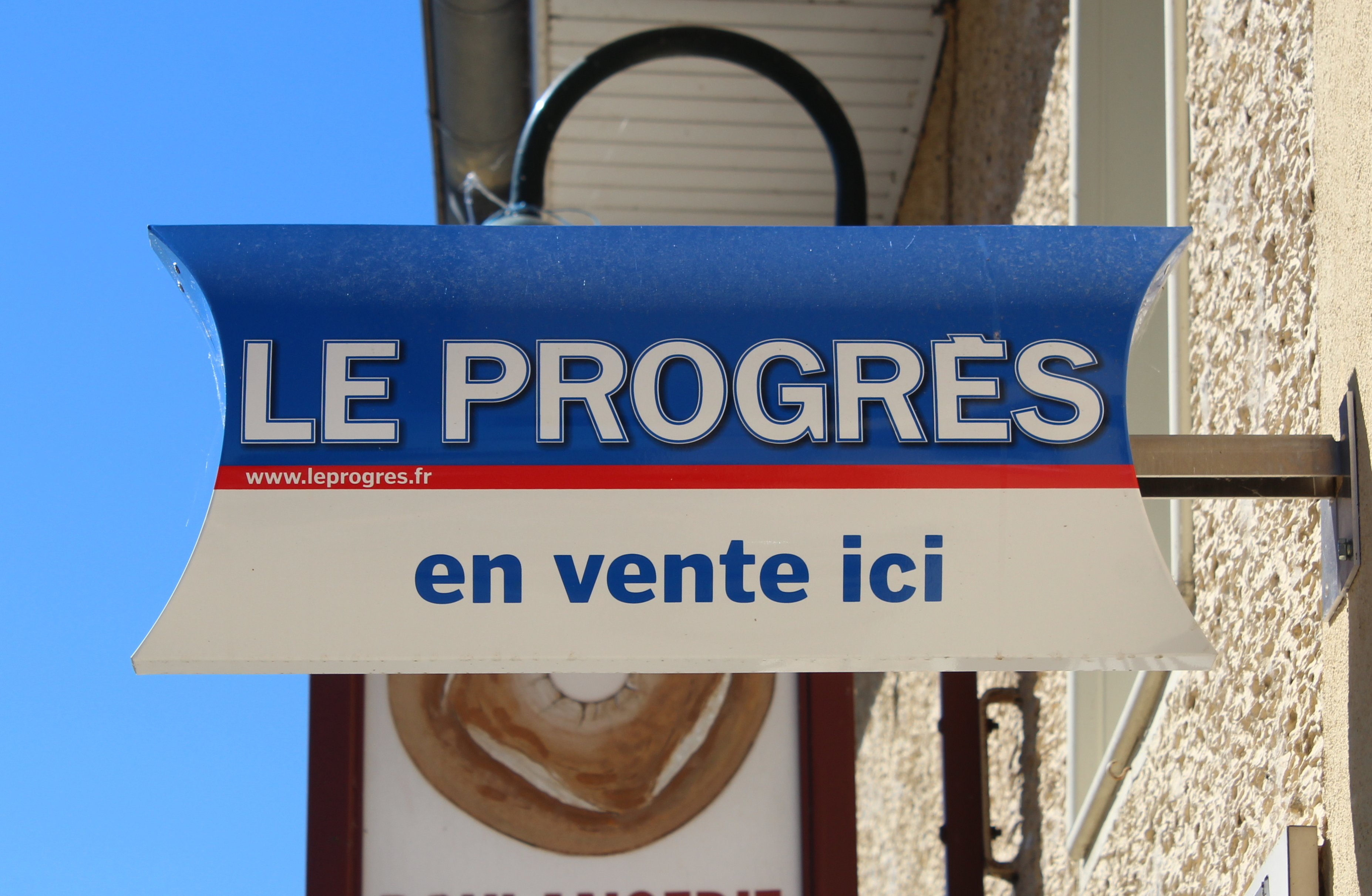 Panneau indiquant que Le Progrès est en vente dans la boulangerie de la rue du Menthon, Saint-Cyr-sur-Menthon.